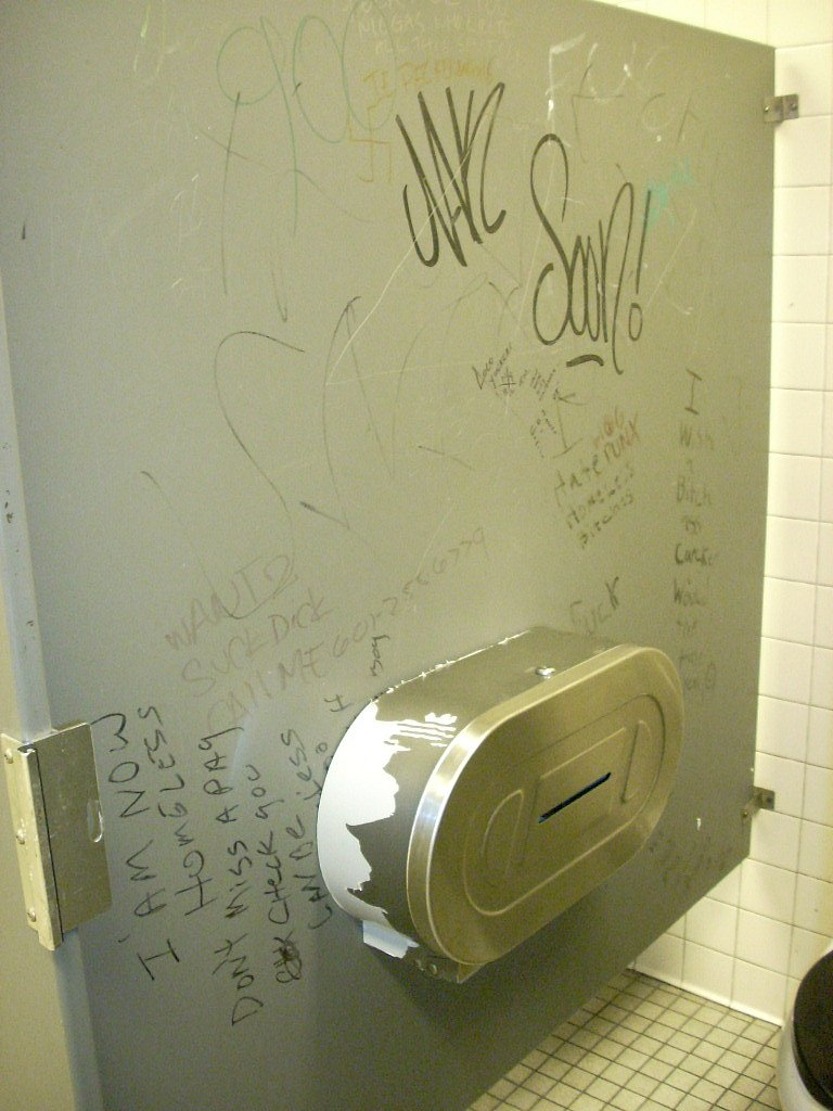 Toilet graffiti